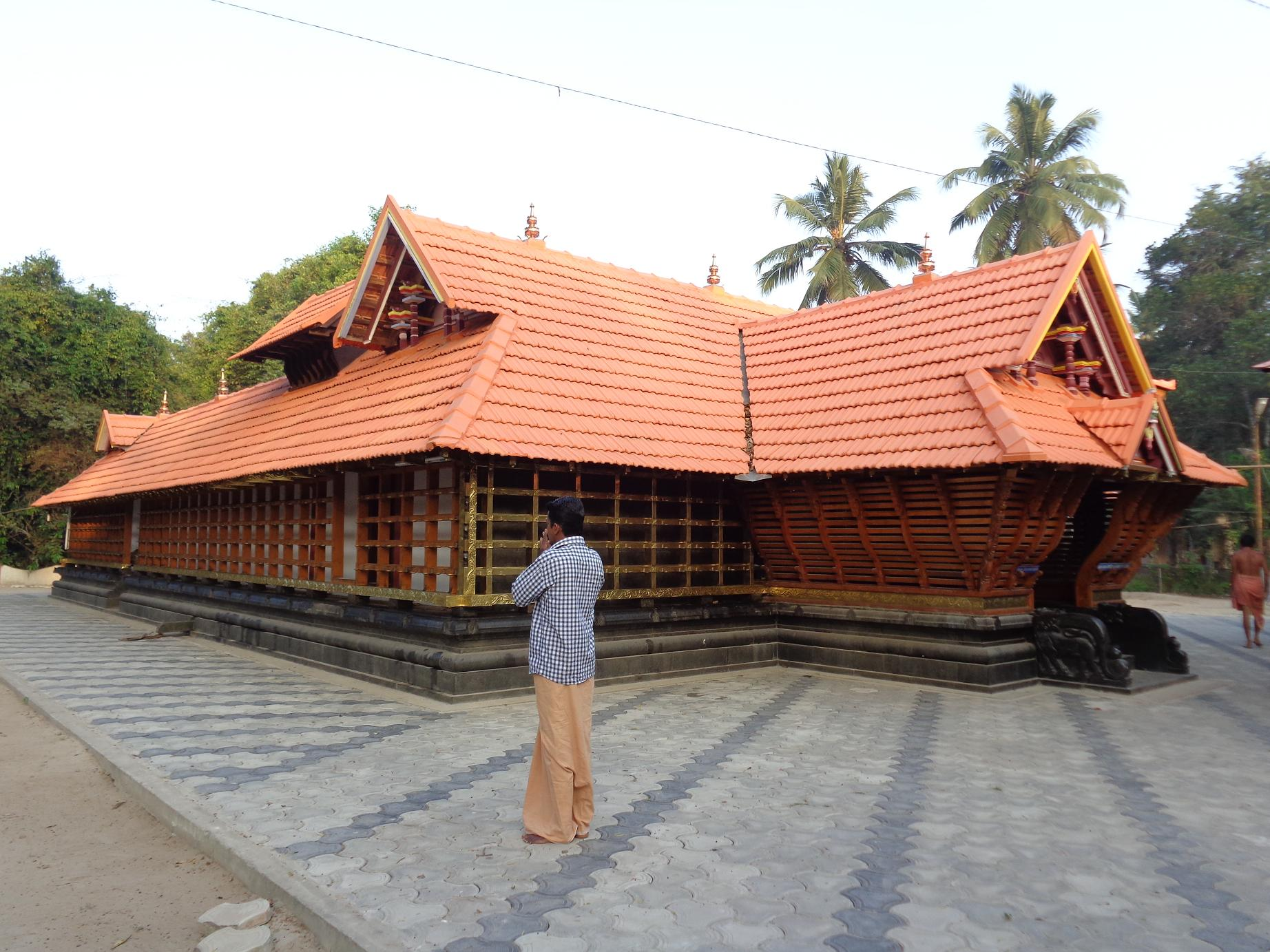 മുള്ളിക്കുളങ്ങര ദേവിക്ഷേത്രം വിശാലദൃശ്യം